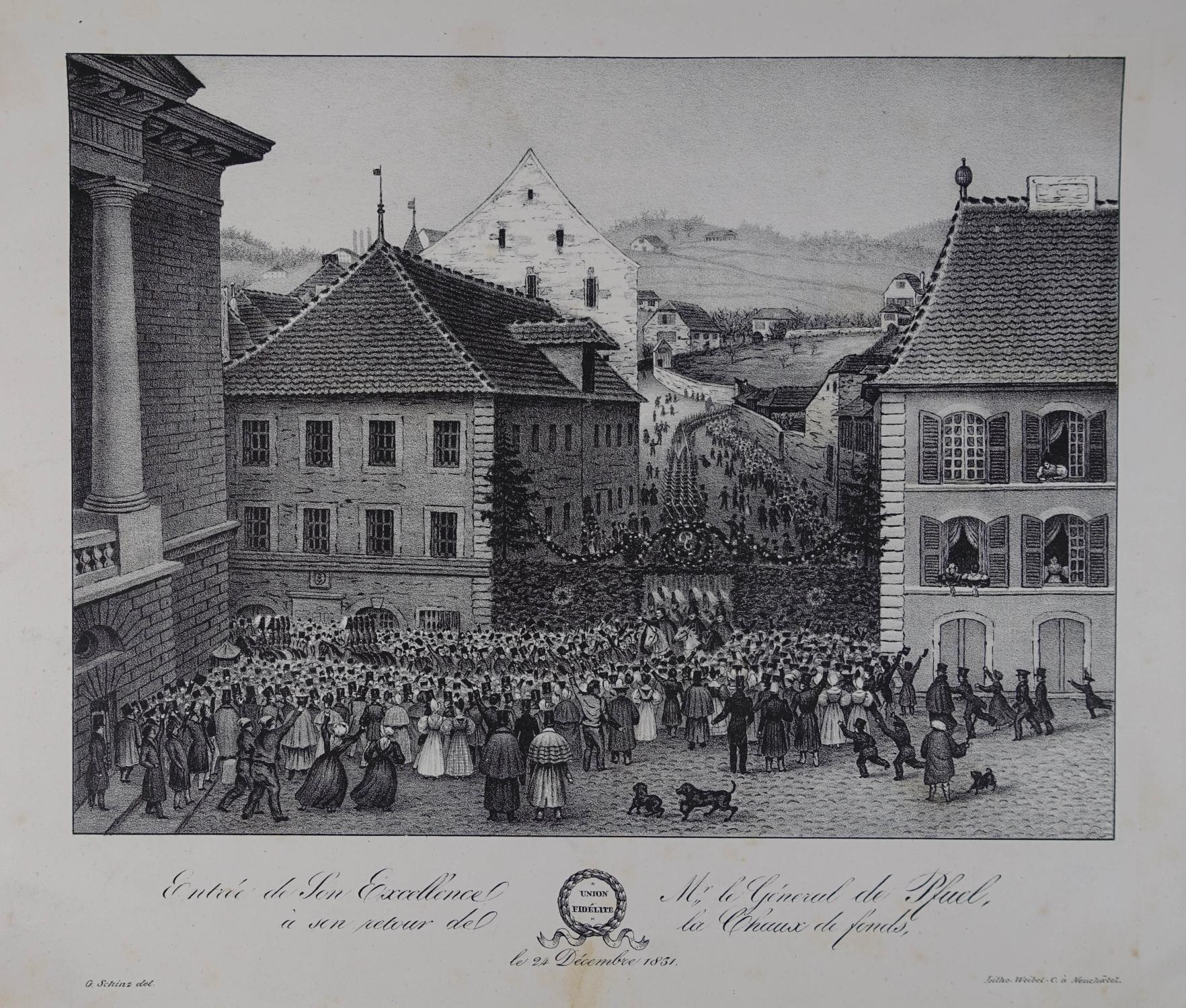 Die triumphale Rückkehr des Generals Ernst von Pfuel (1779-1866) nach der Niederschlagung des Aufstandes der Eidgenossen am 17. und 18. Dezember 1831 (Neuchâtel).